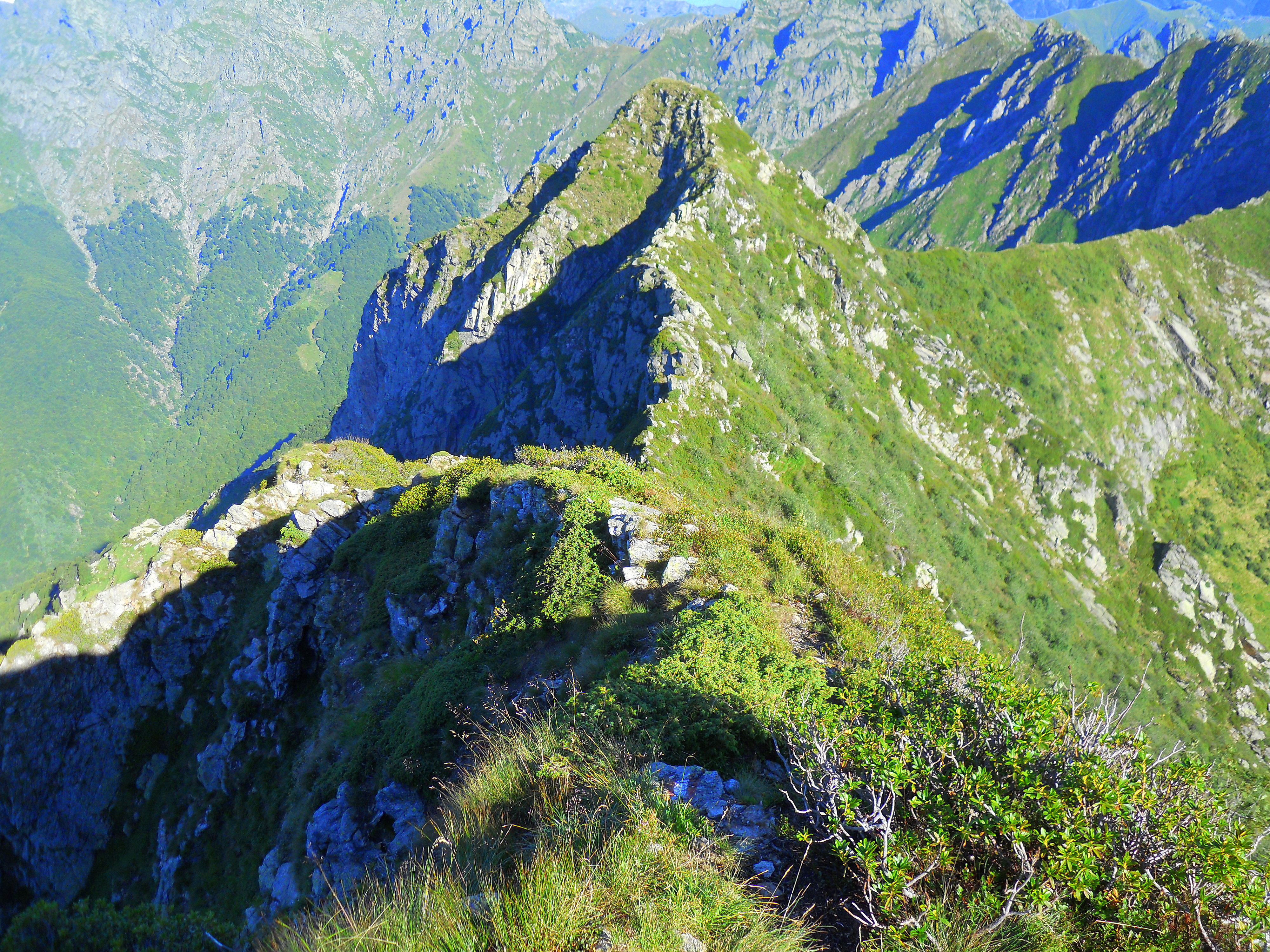 Passaggi aerei verso la Piota